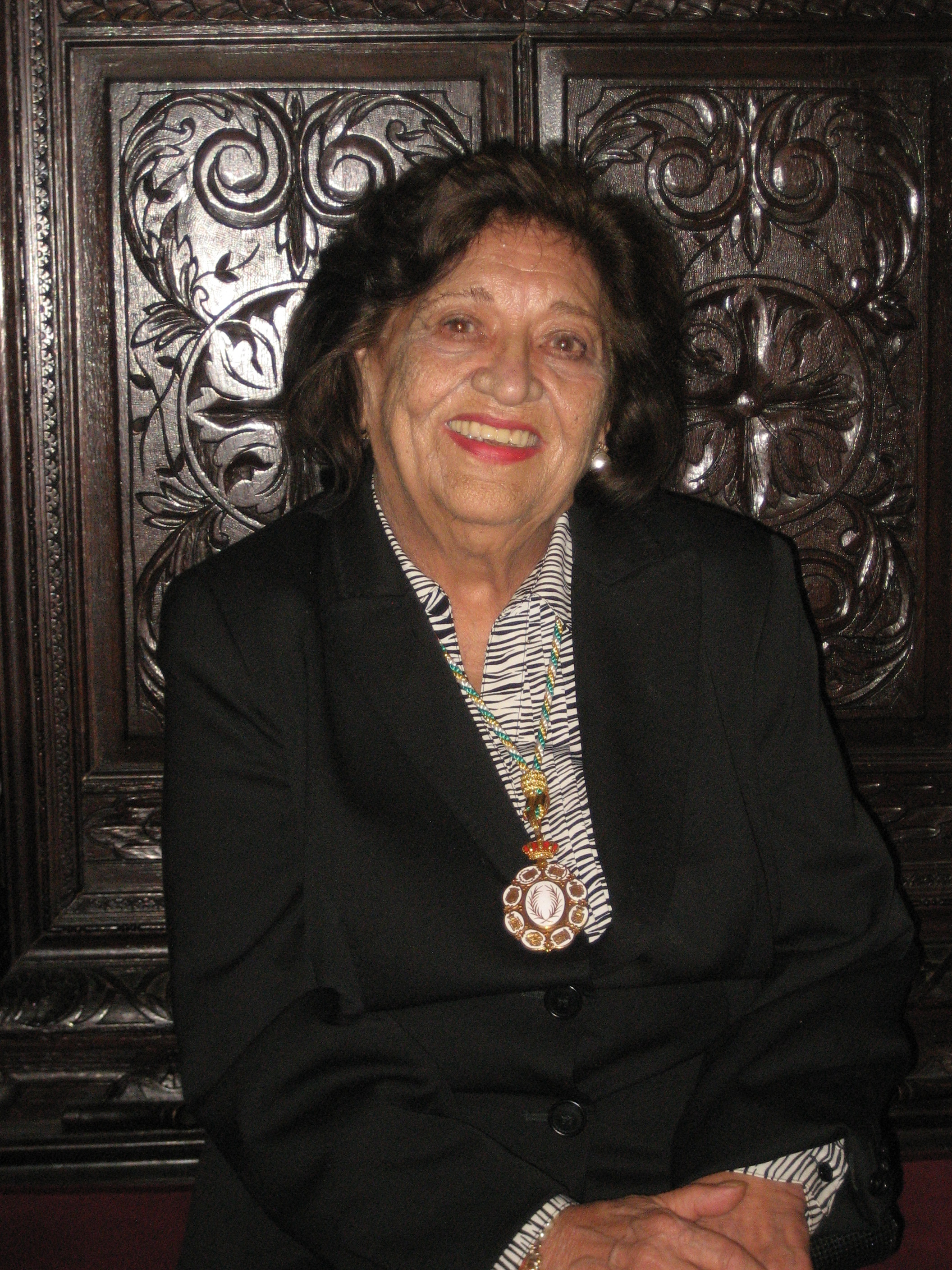 Pilar Paz Pasamar